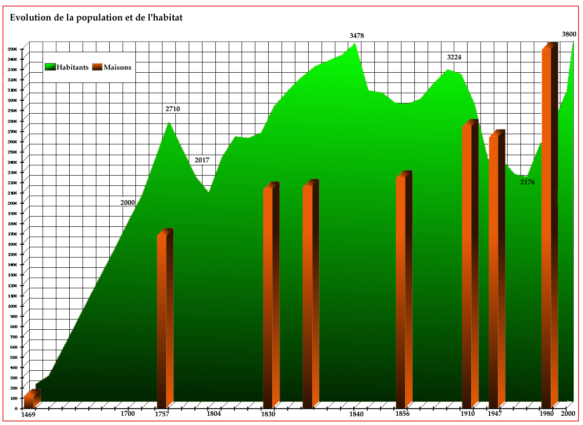 Evolution de la population d'Olne